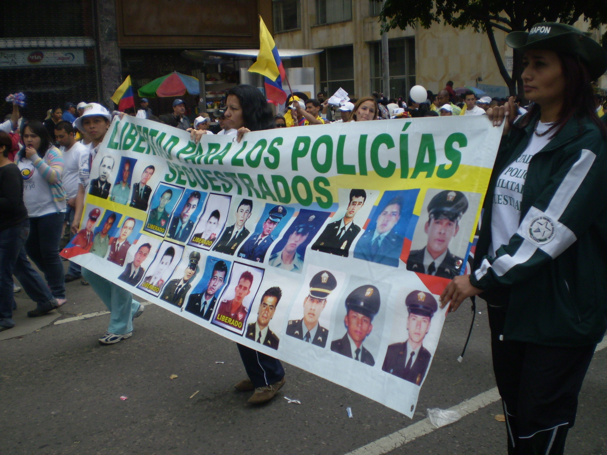 Marchas del 20 de julio de 2008 en Colombia. Foto por: Julián Ortega Martínez / equinoXio